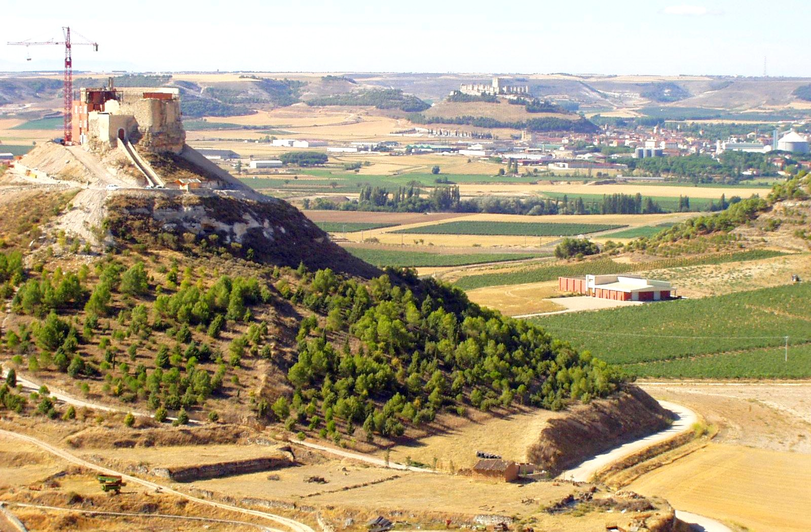 Curiel de Duero. Castillo. Trascastillo. Bodega Comerge. Castillo de Peñafiel. Valle del Cuco. Campo de Peñafiel. Ribera del Duero. Valladolid